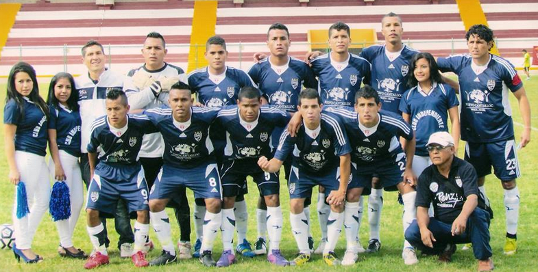 Independiente Cantayo en el Estadio Hugo Sotil de Parcona antes de enfrentar al Octavio Espinoza por la primera fase de la etapa departamental de Ica 2013.